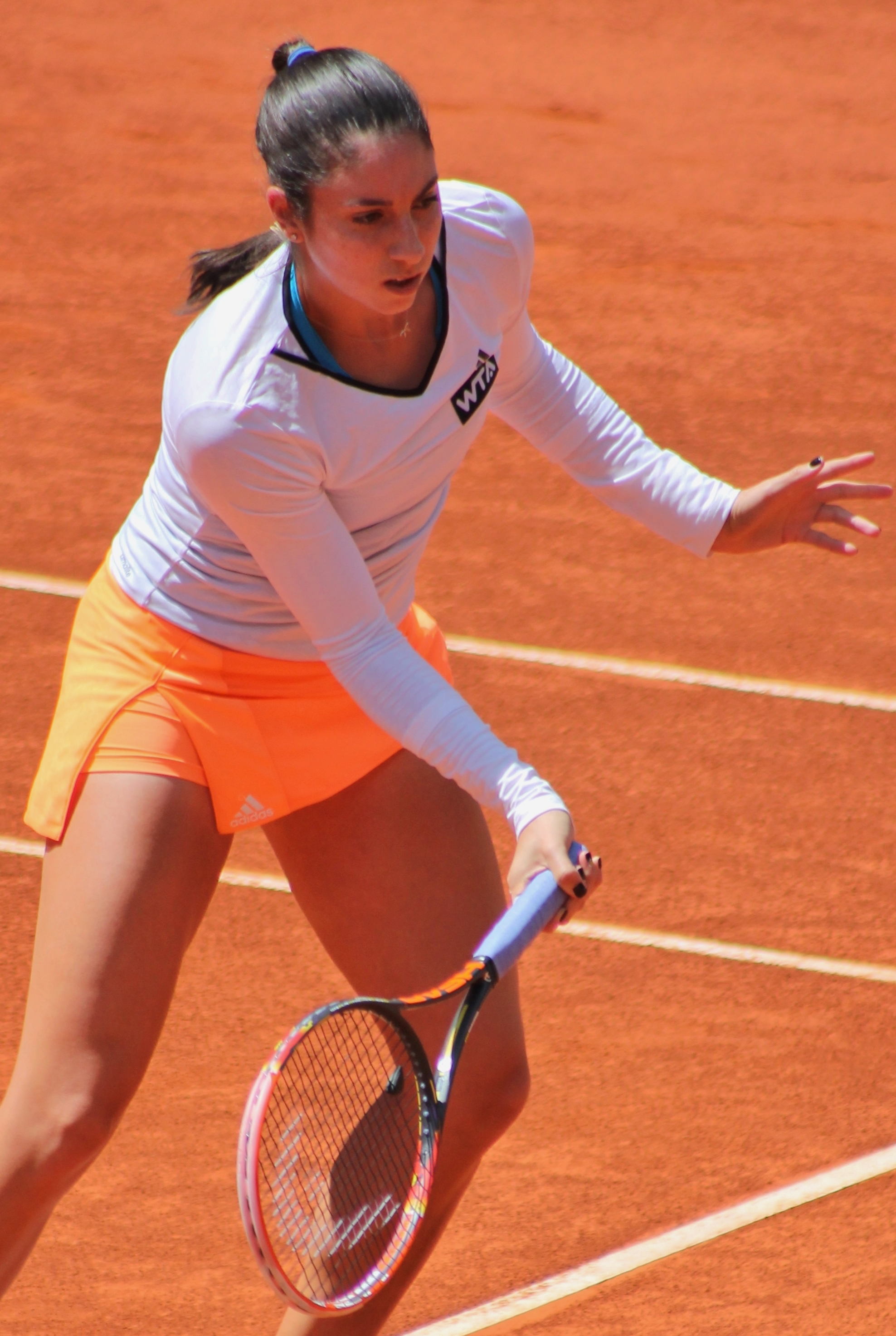 McHale MA14 (5)